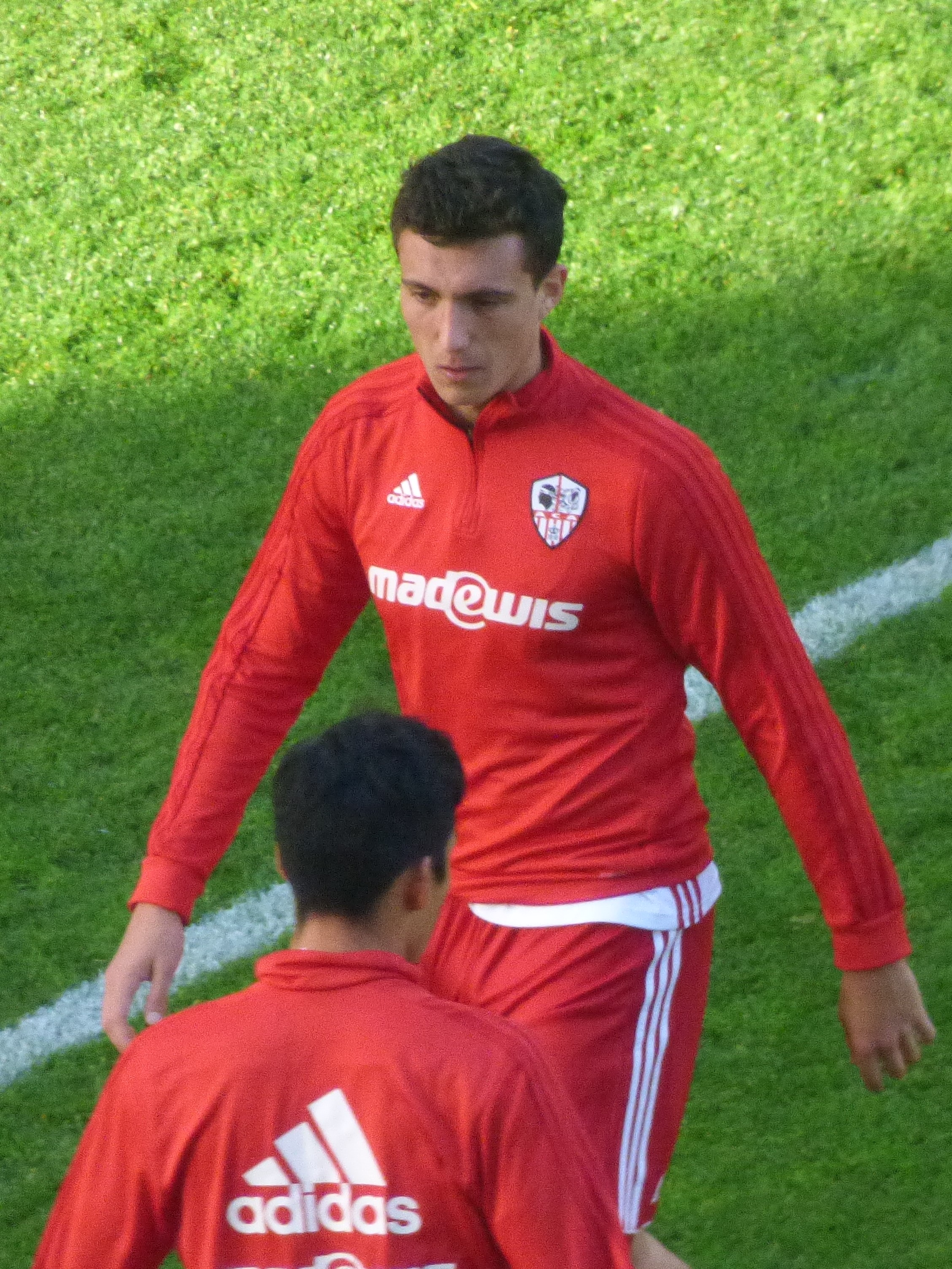 Lucas Pellegrini avant le match RC Lens - AC Ajaccio, comptant pour la dix-neuvième journée du championnat de France de Ligue 2 2018-2019, le 22 décembre 2018, au Stade Bollaert-Delelis de Lens.